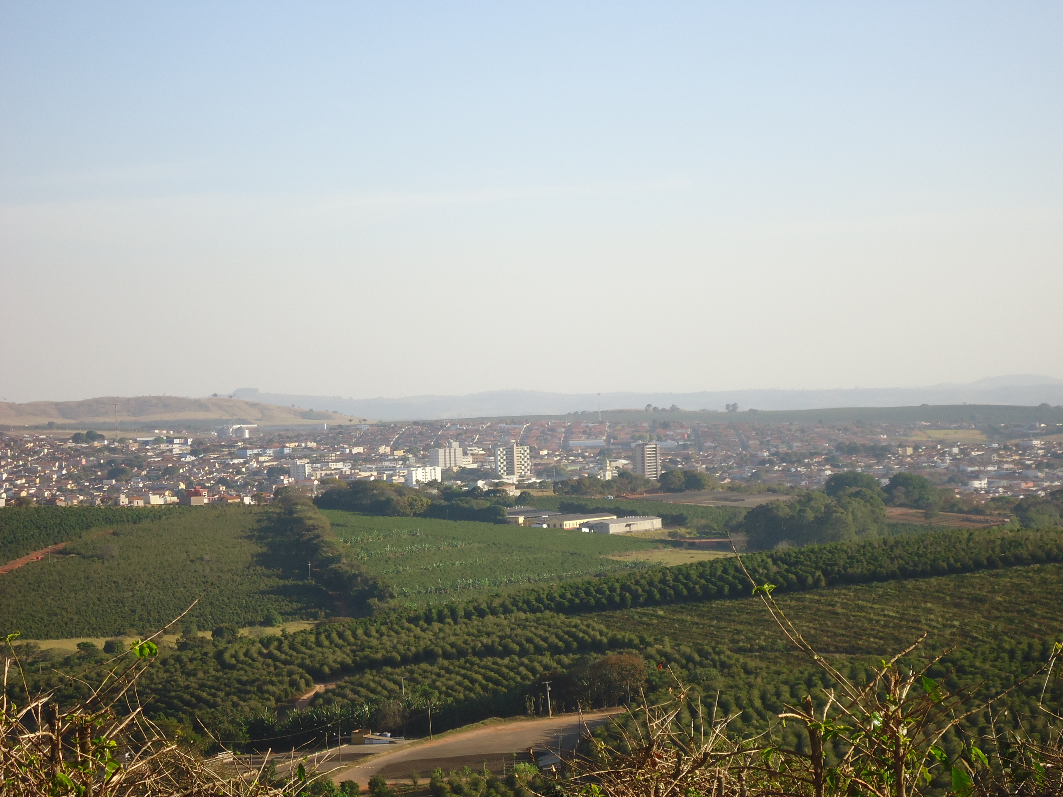 Vista de Três Pontas, no sul de minas.